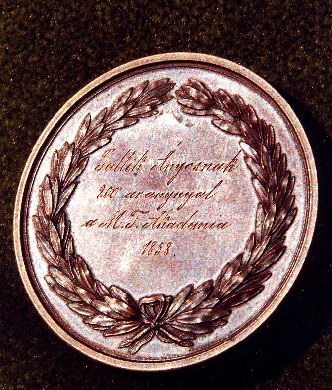 Jedlik Ányos díja a Magyar Tudományos Akadémiától